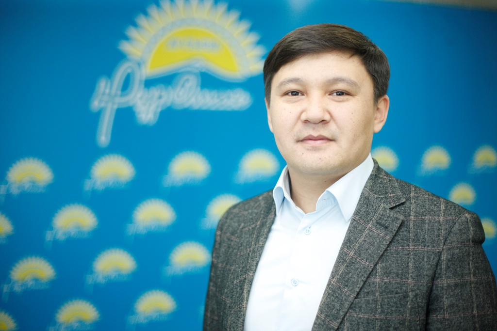 Фотография Нурлана Сыдыкова